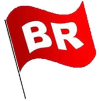 Logotipo Bandera Roja